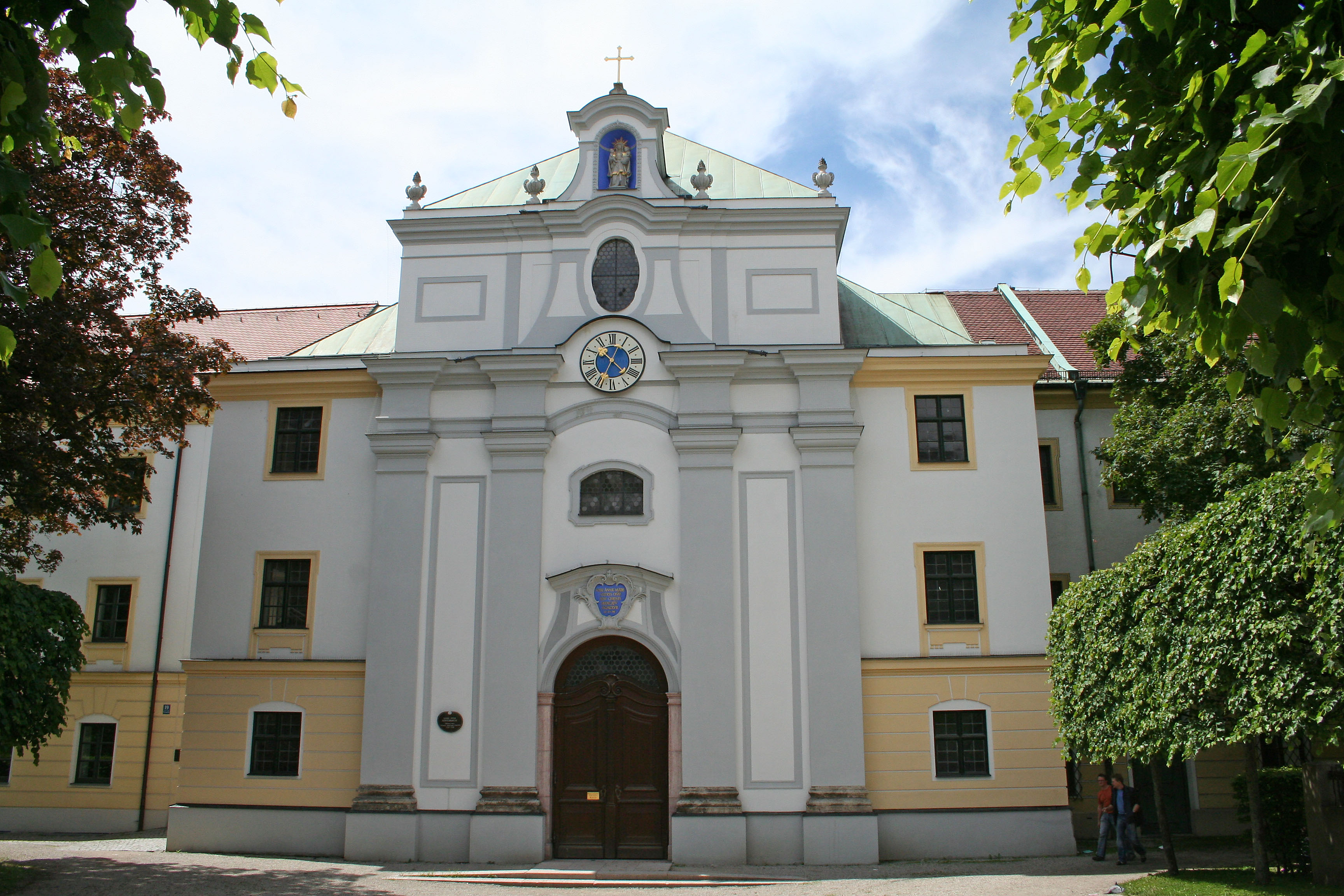 St. Anna Klosterkirche im Lehel (München)